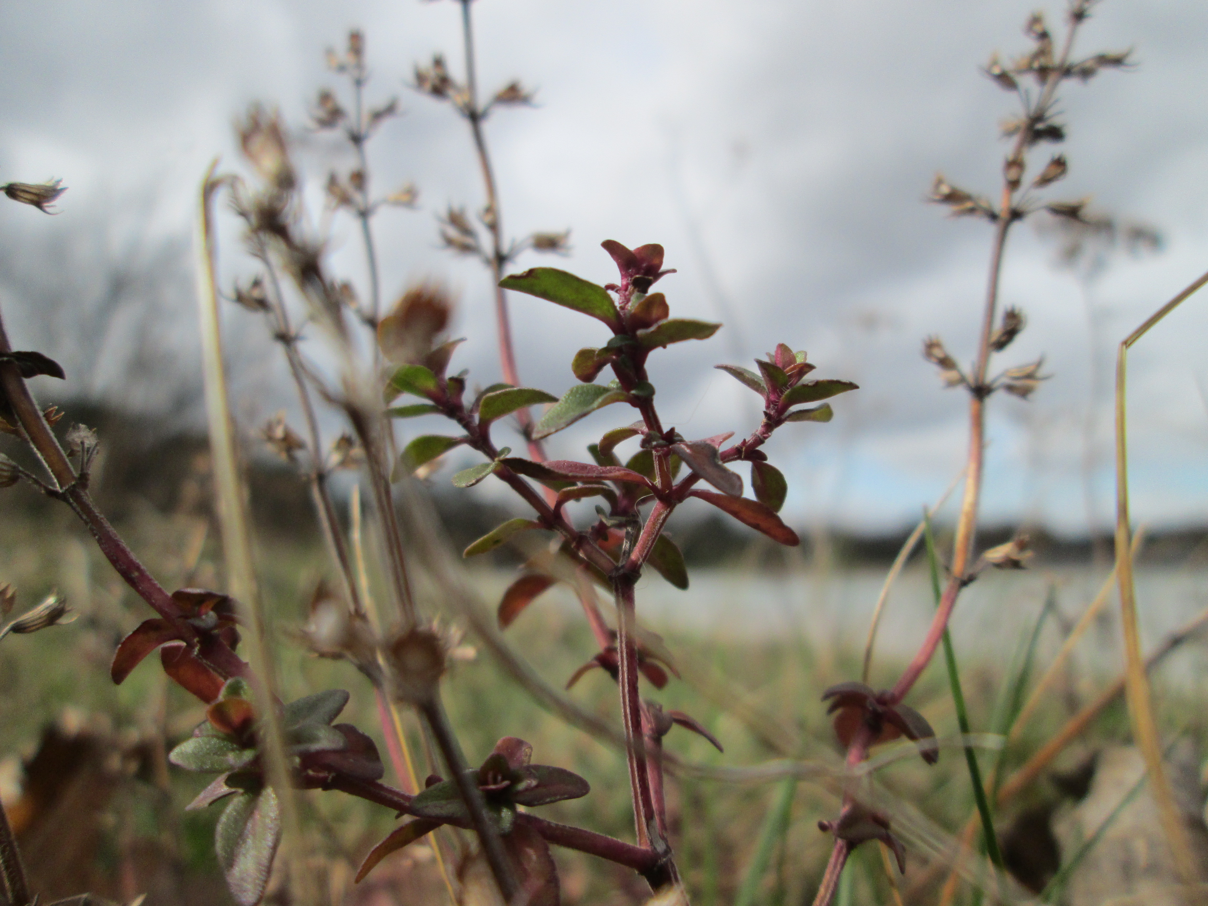 Sand-Thymian (Thymus serpyllum) am Golfplatz im Naturschutzgebiet „Oftersheimer Dünen“